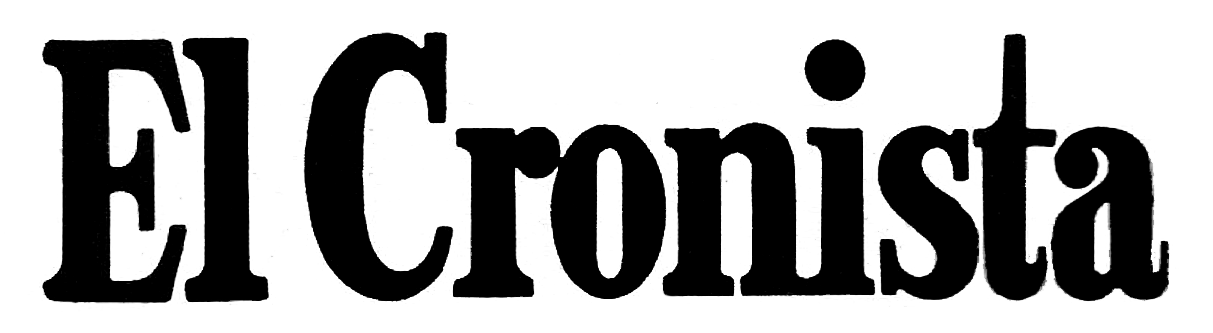 Cabecera del diario chileno El Cronista, editado en Santiago entre 1975 y 1980 como reemplazo del diario La Nación.